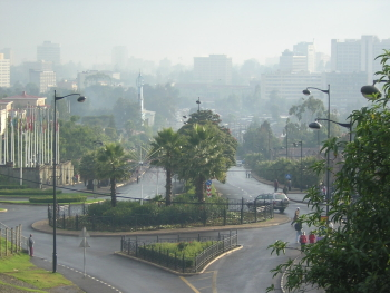 Vy över Addis Abeba Centrum